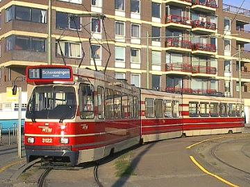 GTL8-II-tram (Den Haag) bij het eindpunt van lijn 11